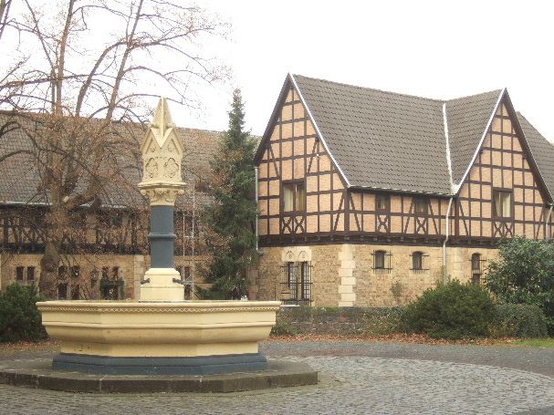 Kommende Ramersdorf, Innenhof – „Schlosshof“